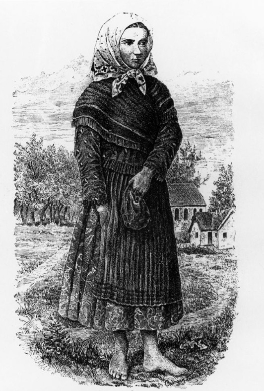 Solymosi Eszter (Ábrányi Lajos rekonstrukciója nyomán)